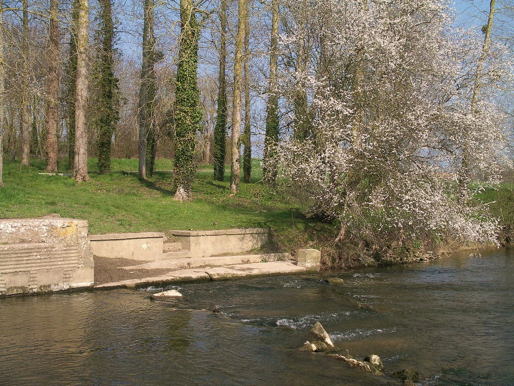 vestiges du lavoir de Banville au Pont de Reviers sur la Seulles (Calvados)